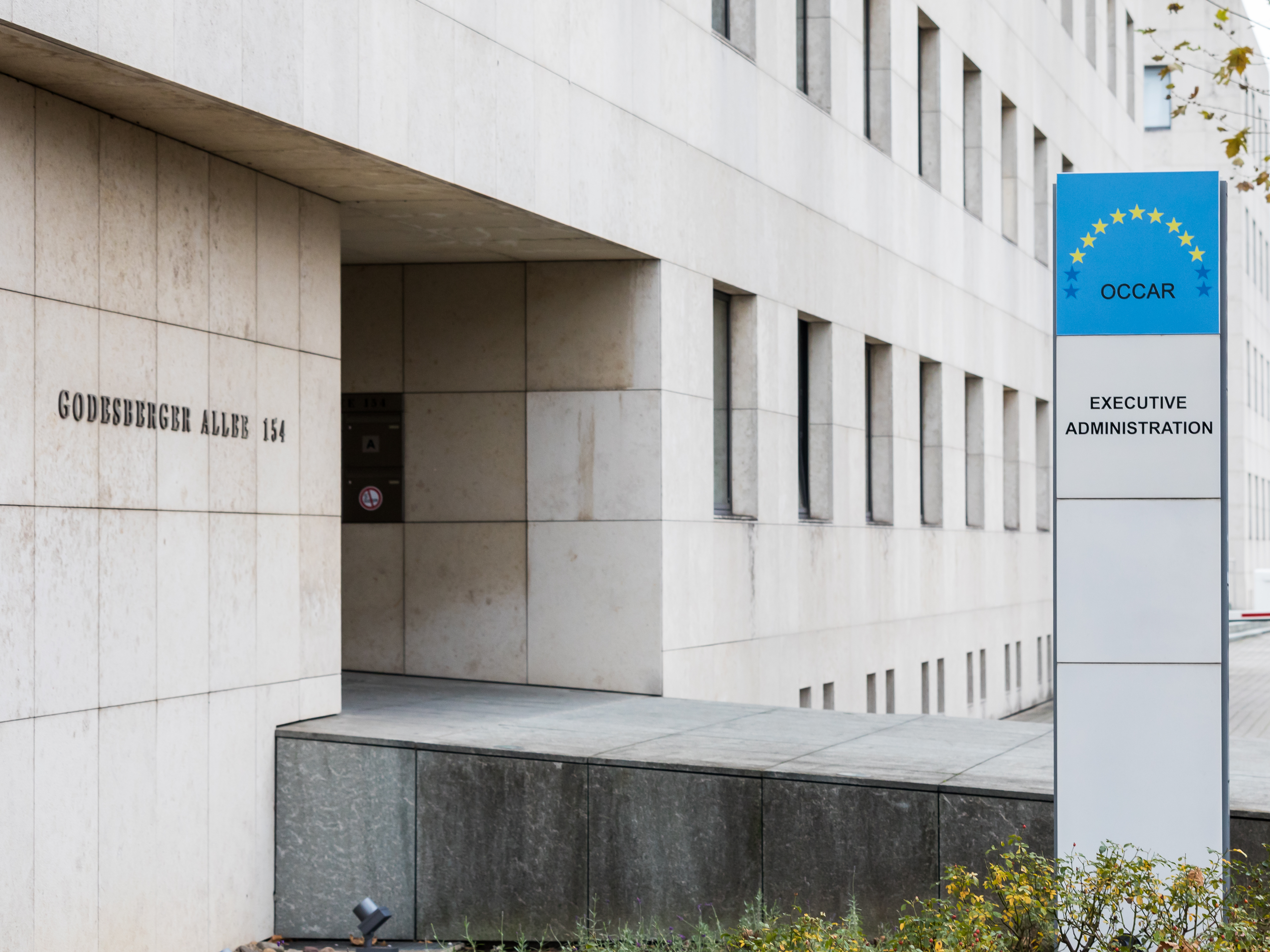 OCCAR (Organisation Conjointe de Coopération en Matière d’Armement), Godesberger Allee 154, Bonn